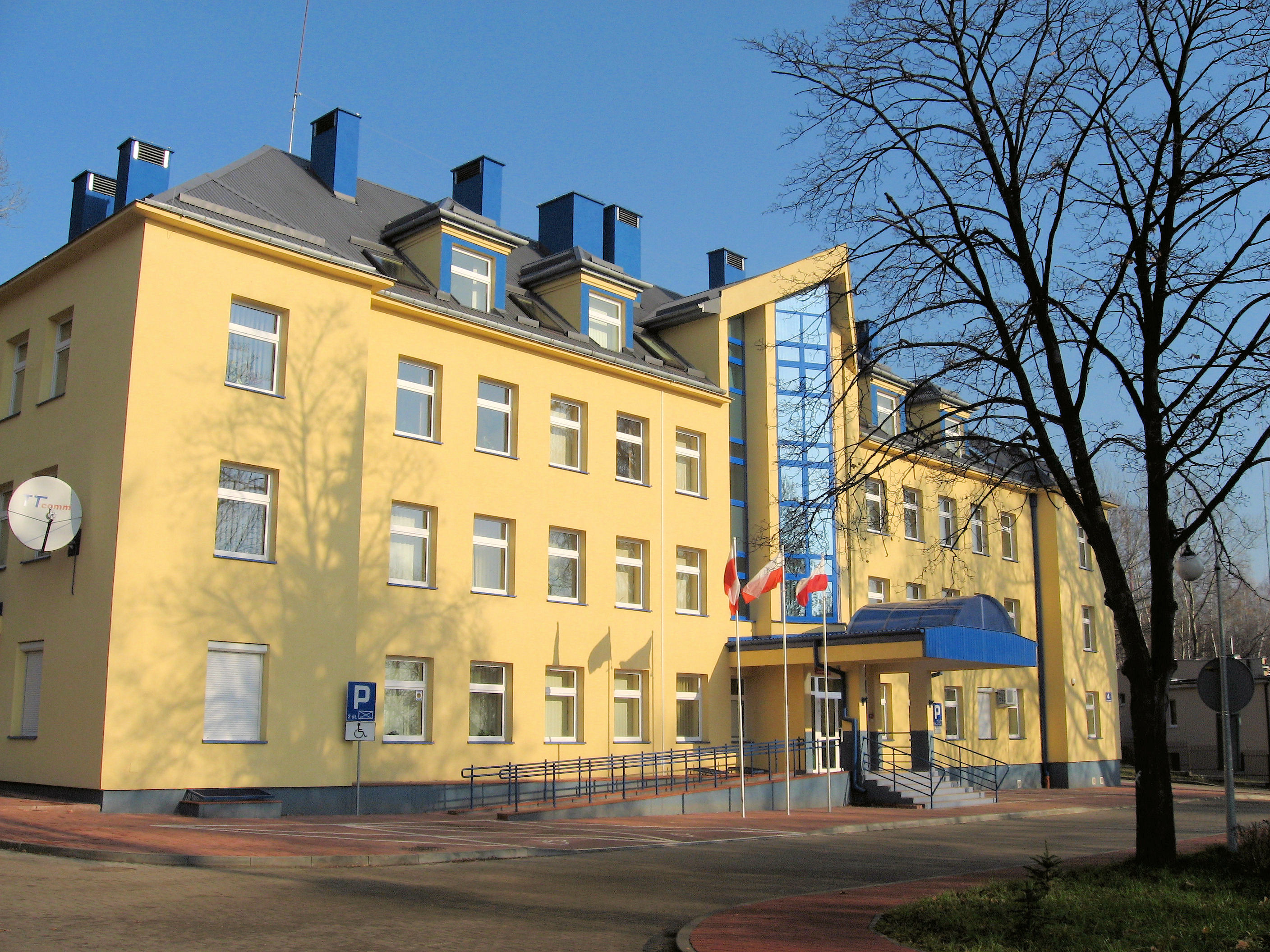 Budynek Starostwa Powiatowego w Starachowicach (izo)